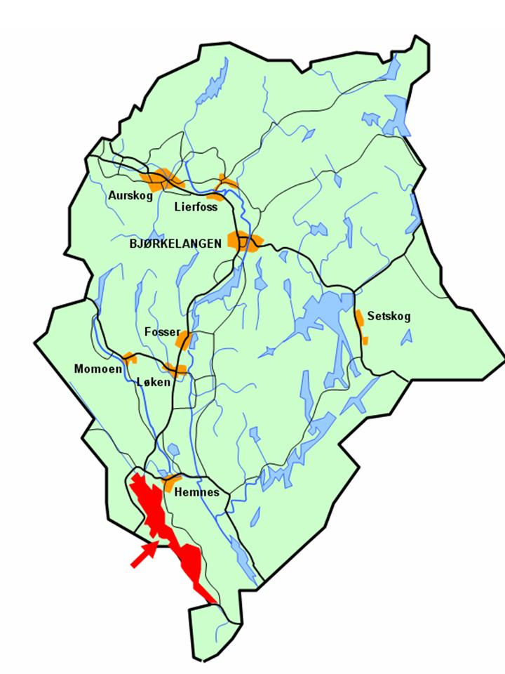 Øgderens lokalisering i Aurskog-Høland kommune.